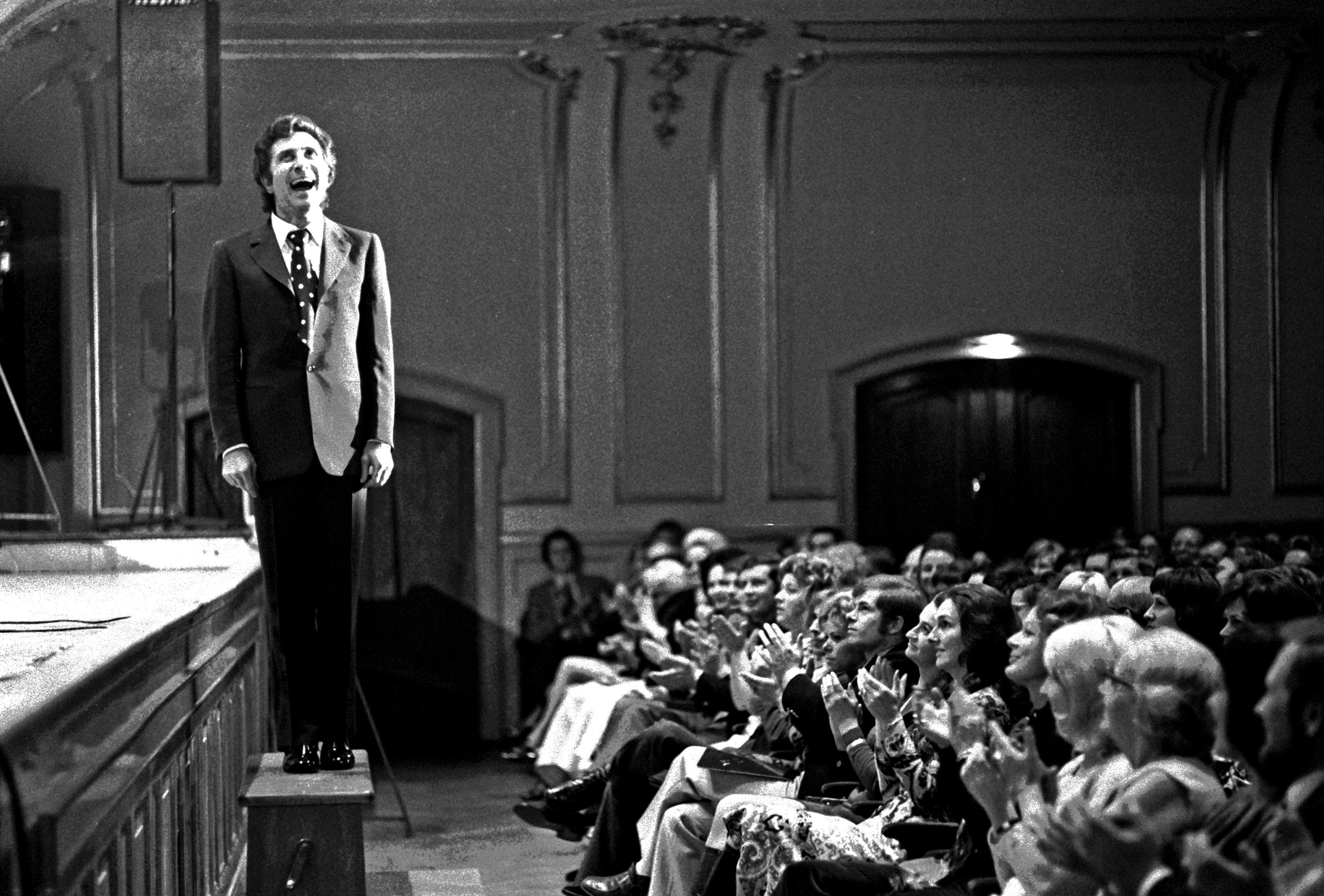 1000 Volt in der Musikhalle: Gilbert Bécaud in der Musikhalle Hamburg, 1971 Besucht bitte auch meine Homepage